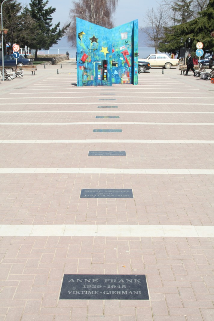 Pogradec פוגרדץ